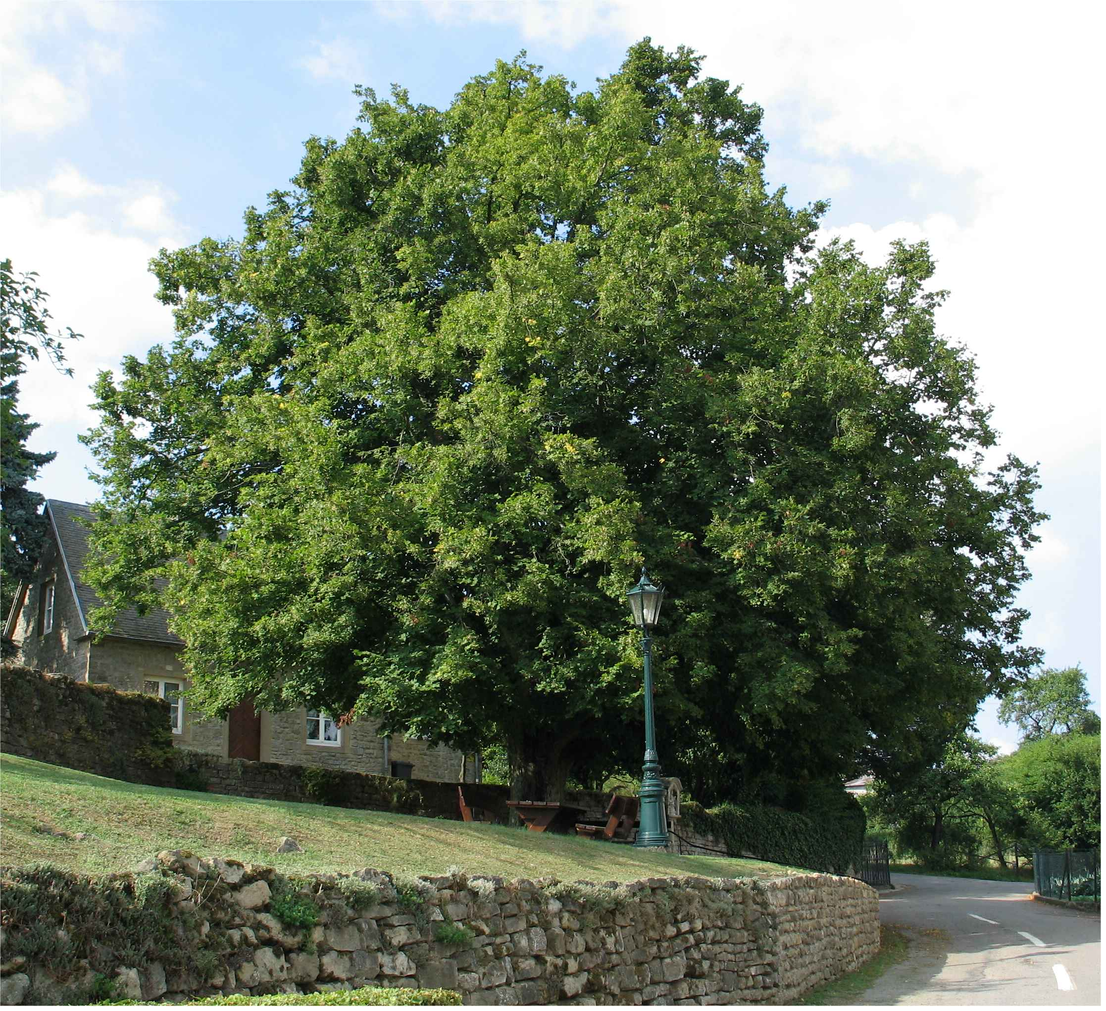 Bei der Kapell op der Giischterklaus.